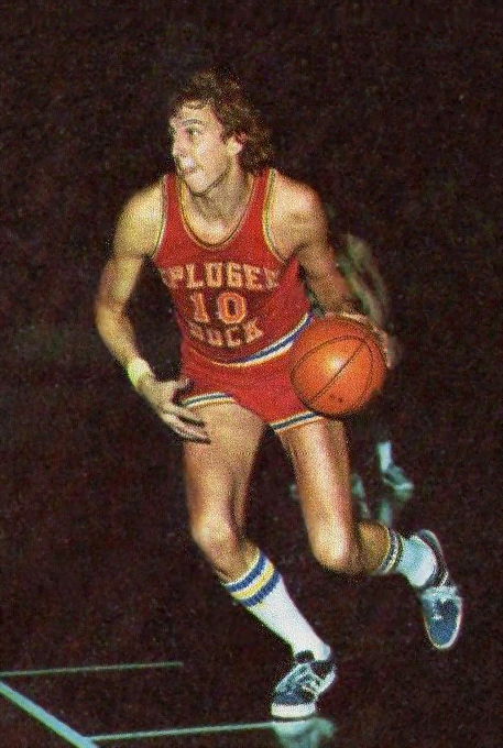 CAMPIONI dello SPORT 1973/74-Figurina n.264- HAWES - USA -PALLACANESTRO